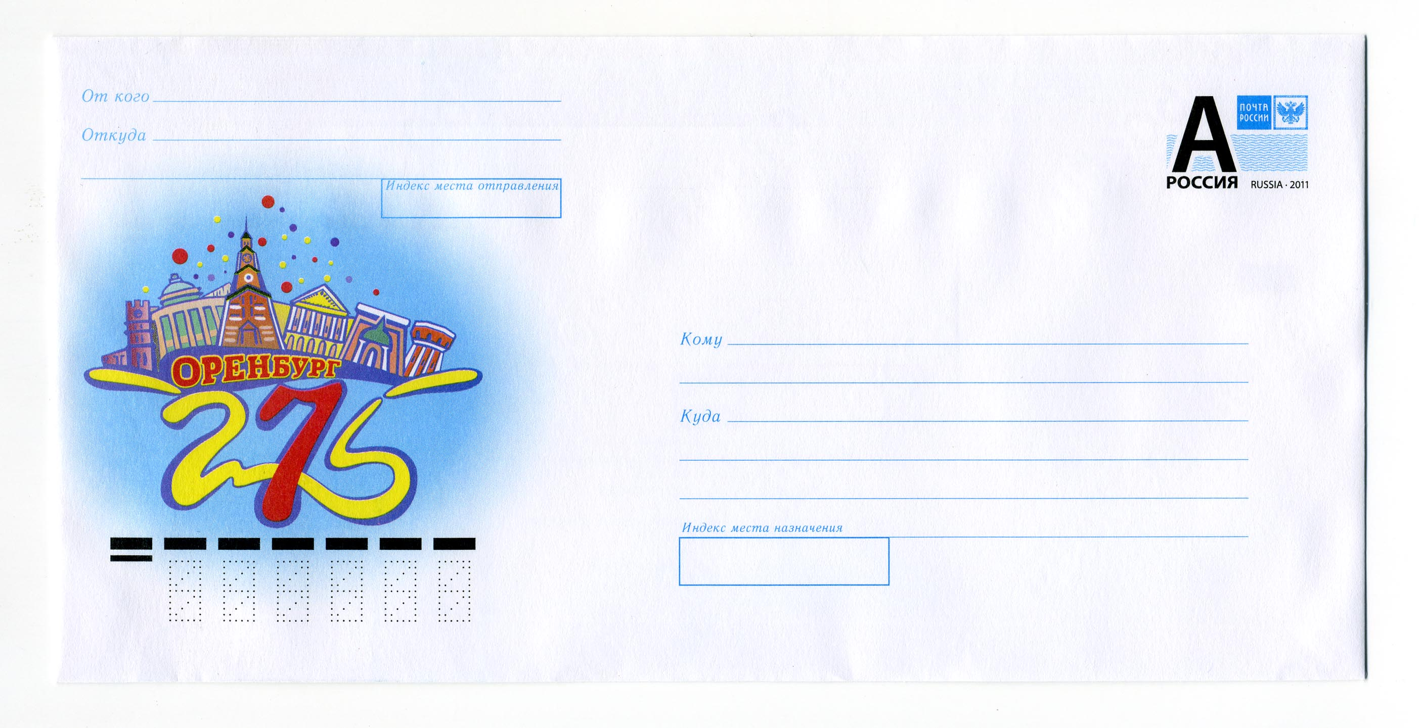 275 лет Оренбургу почтовый конверт Россия